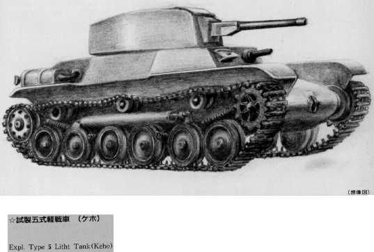 Japanese Type 5 Ke-Ho medium tank